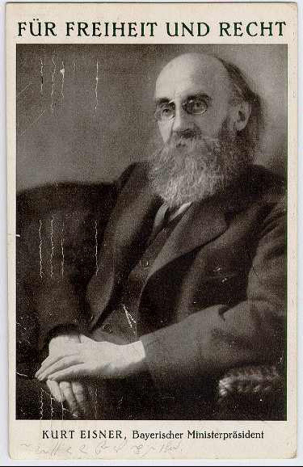 Ansichtskarte - Kurt Eisner, Bayerischer Ministerpräsident